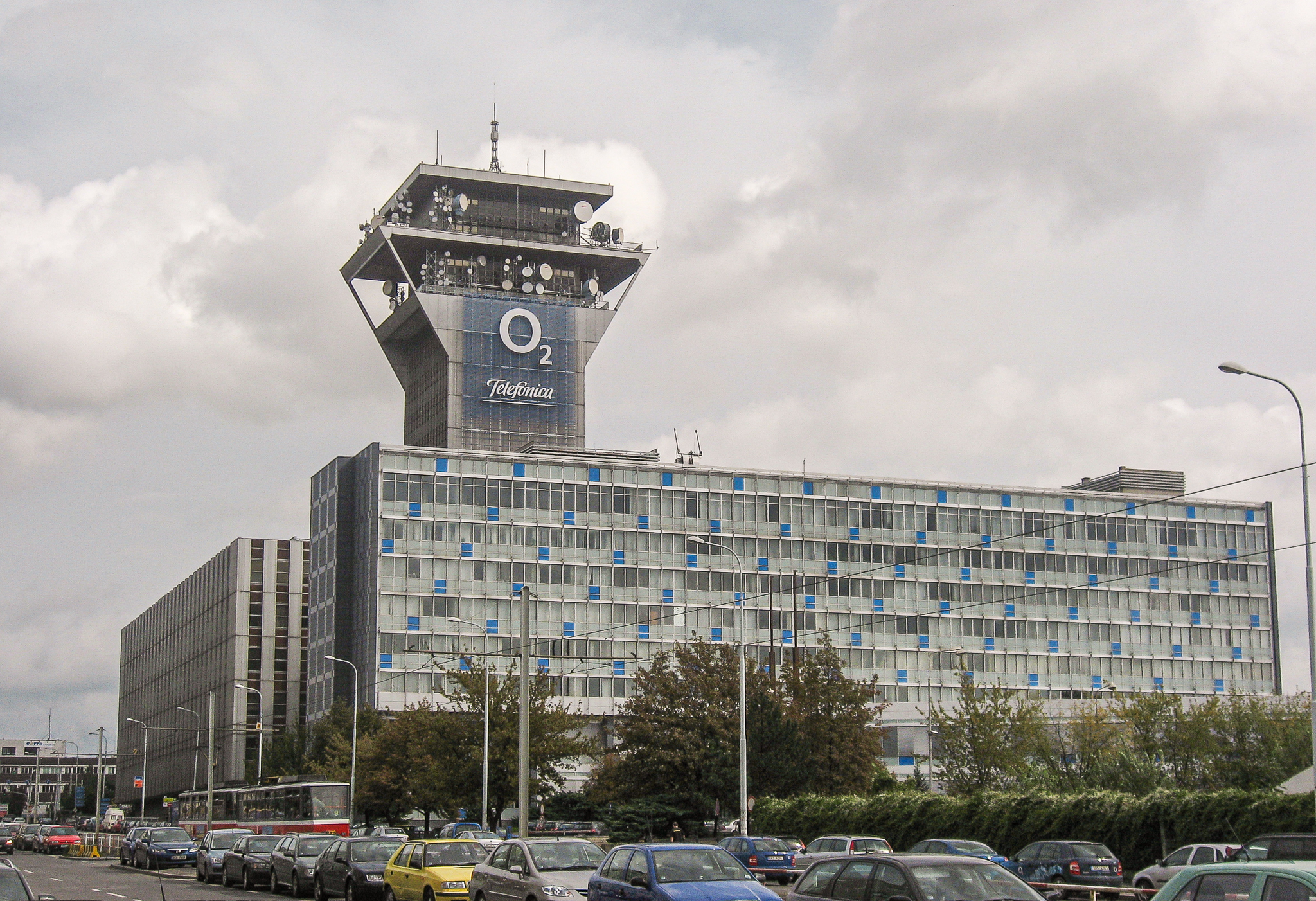 Věž bývalého Tecomu